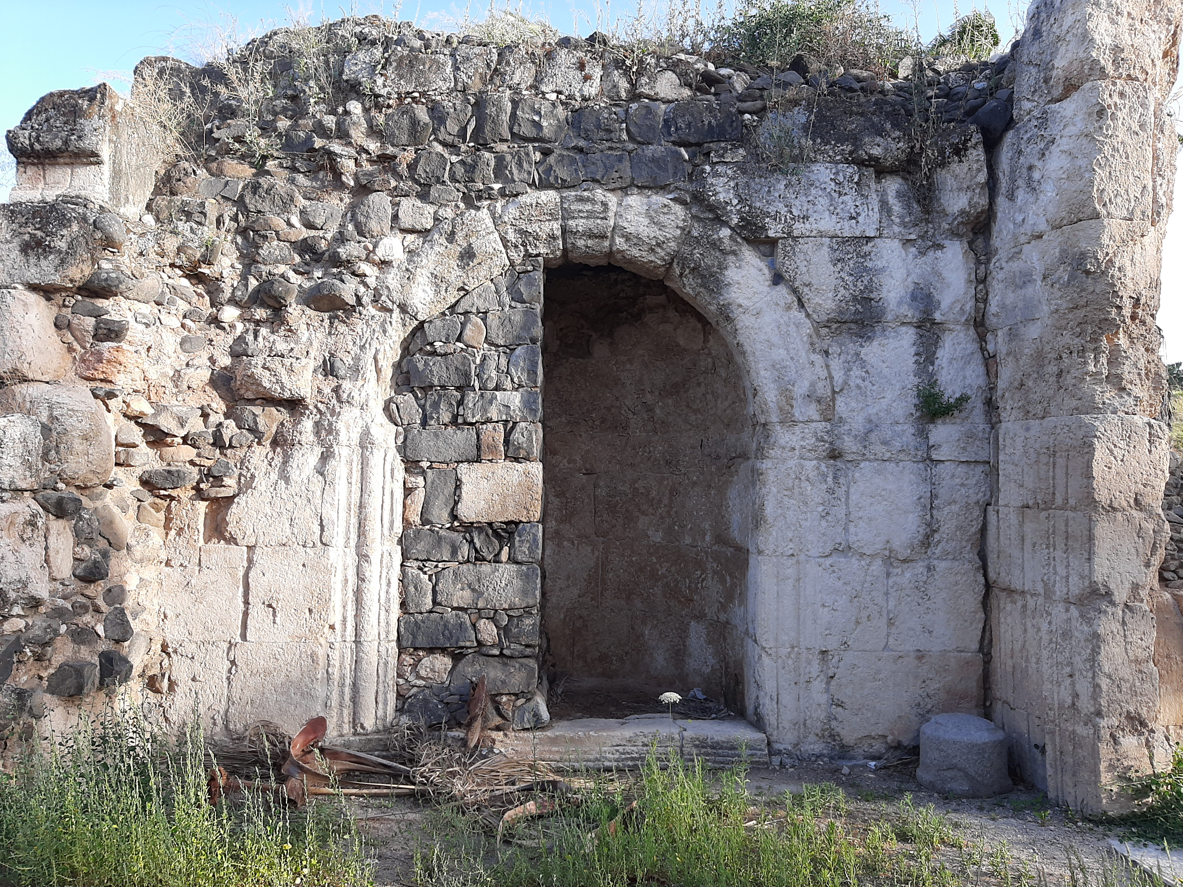 صورة لأنقاض قصر المنية، التقطتها بنفسي Palestine11